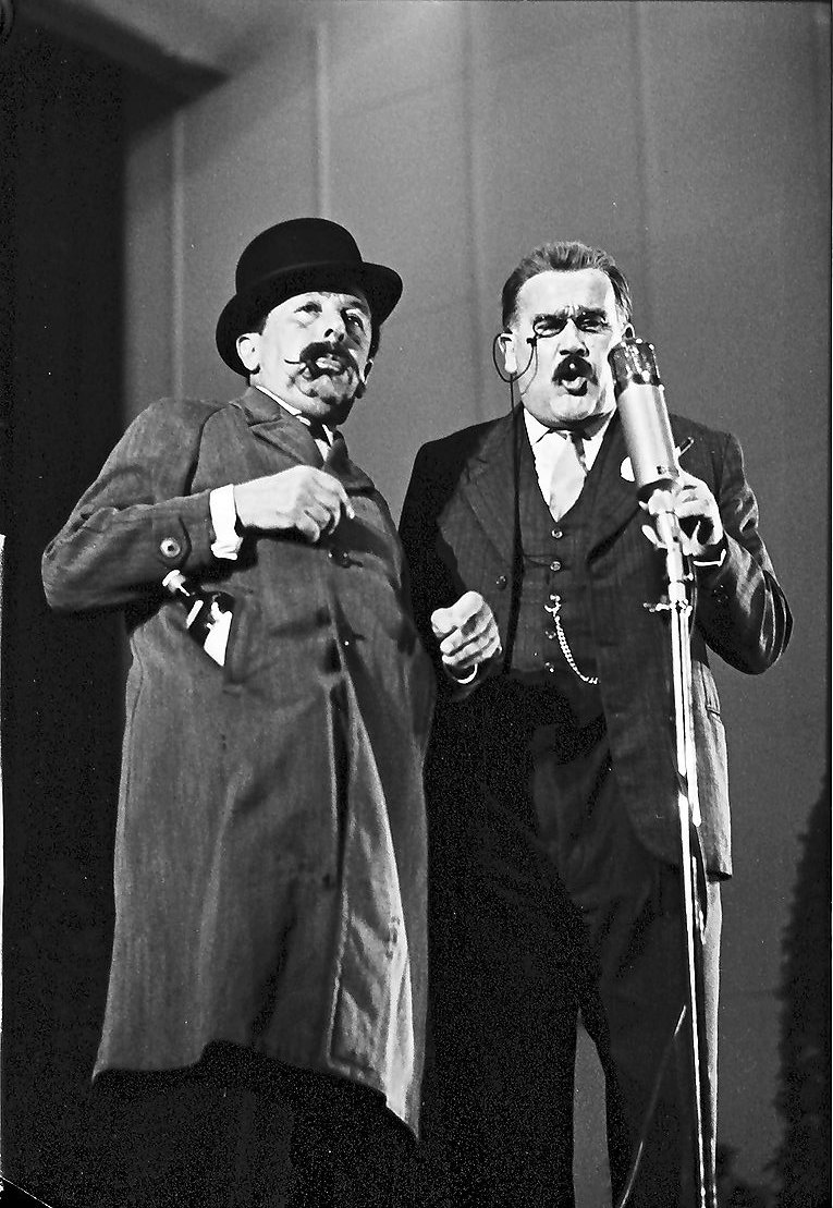 Variété Programm Mez: Häberle und Pfleiderer; Willy Reichert und Oscar Heiler